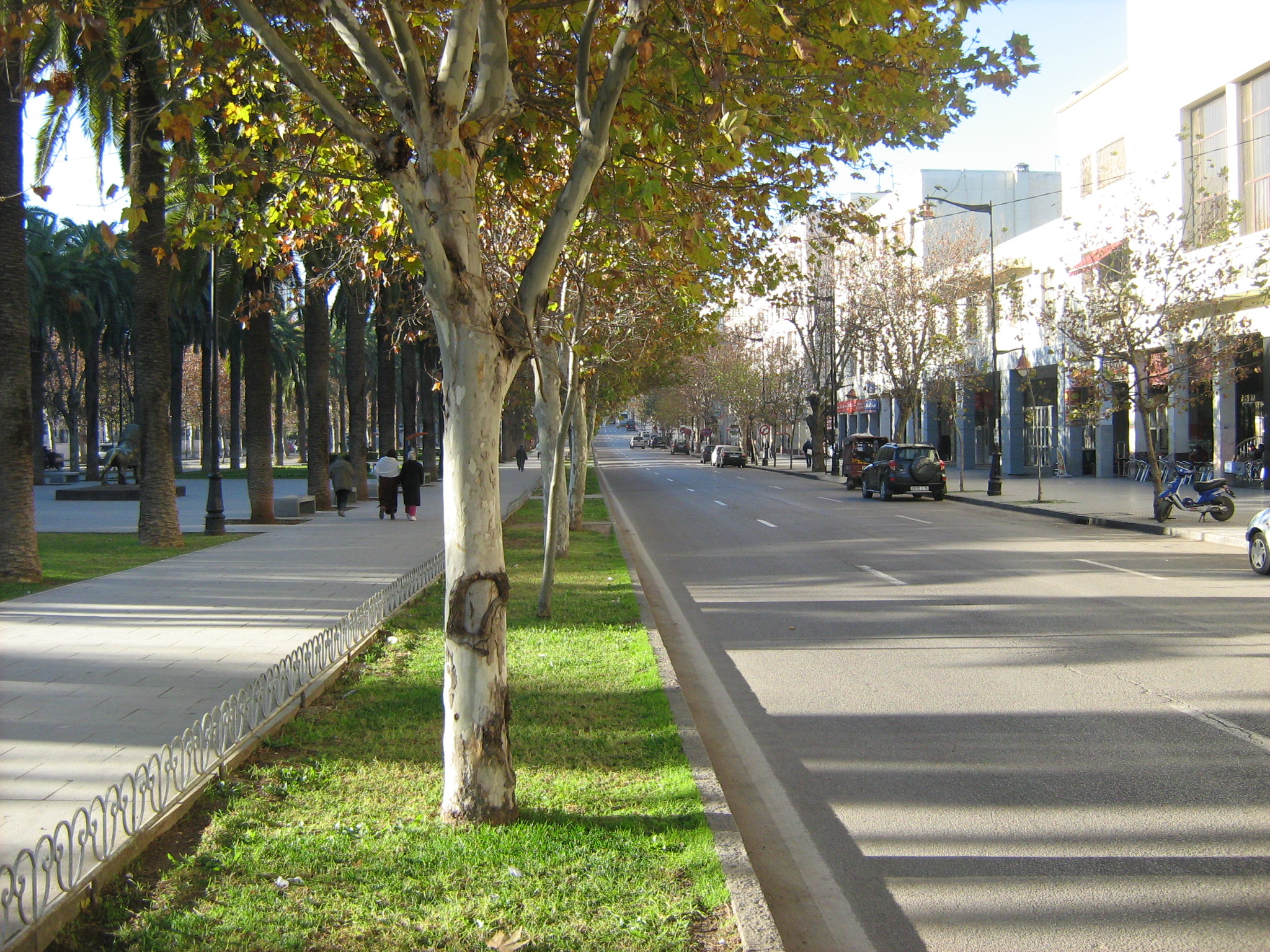 regard vers le sud-ouest, Avenue Hassan II, Ville Nouvelle, Fès